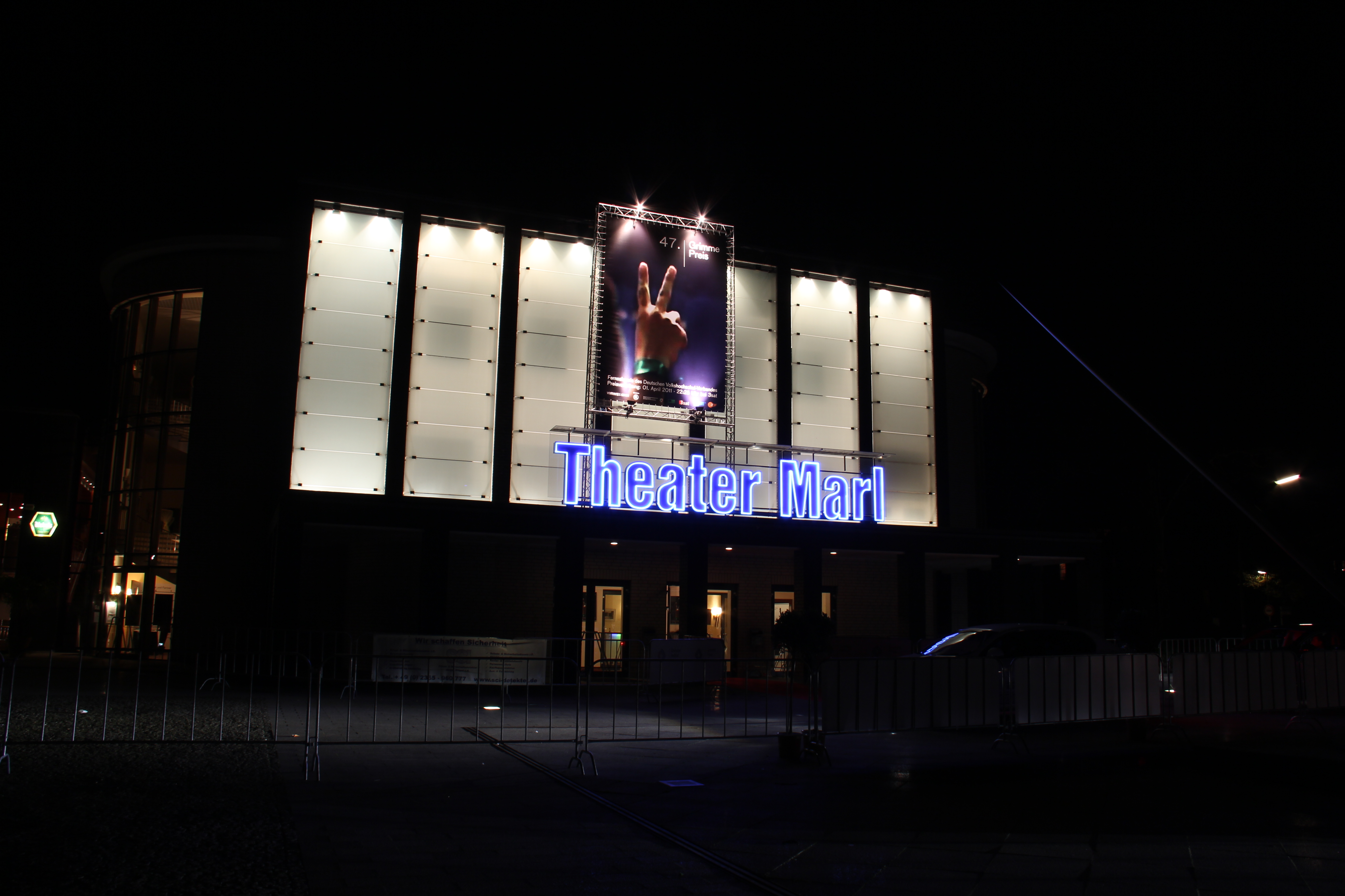 Theater Marl, Austragungsort der Grimme-Preis-Verleihung 2011